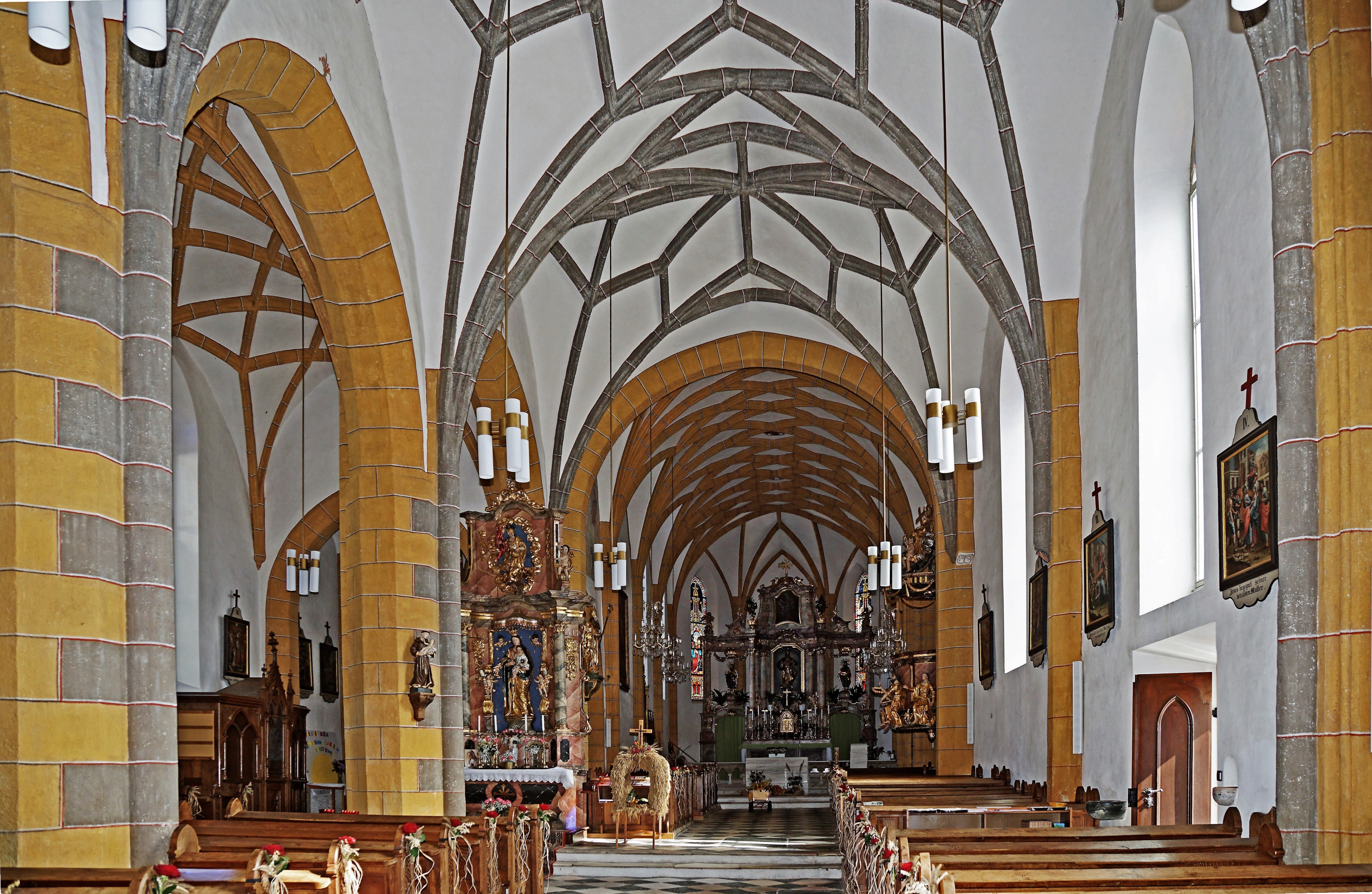 Kath. Pfarrkirche Hll. Petrus und Paulus, Bleiburg, Innenansicht